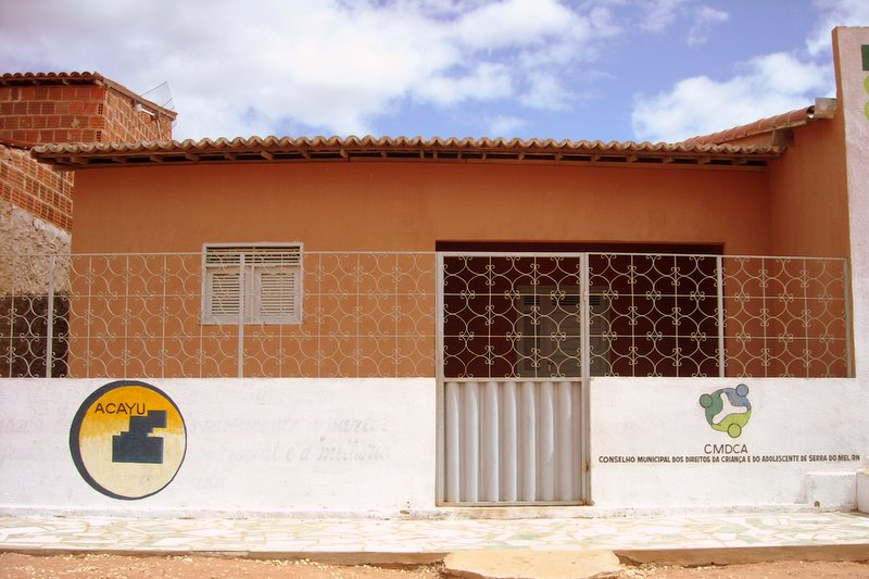 Prédio do CONDICA e Projeto Meninos da Serra